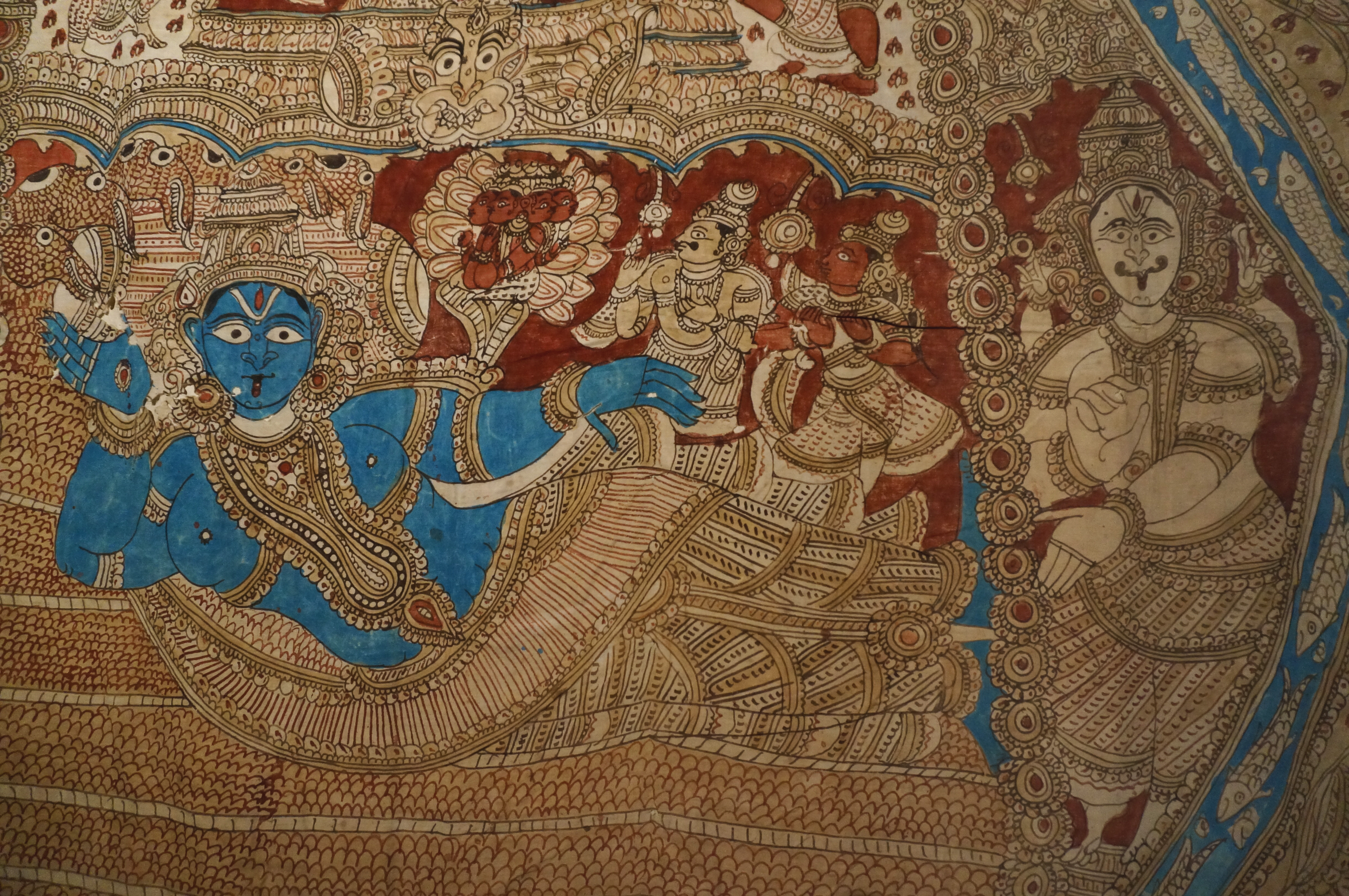 Présentation de pièces de la Collection Krishna Riboud.